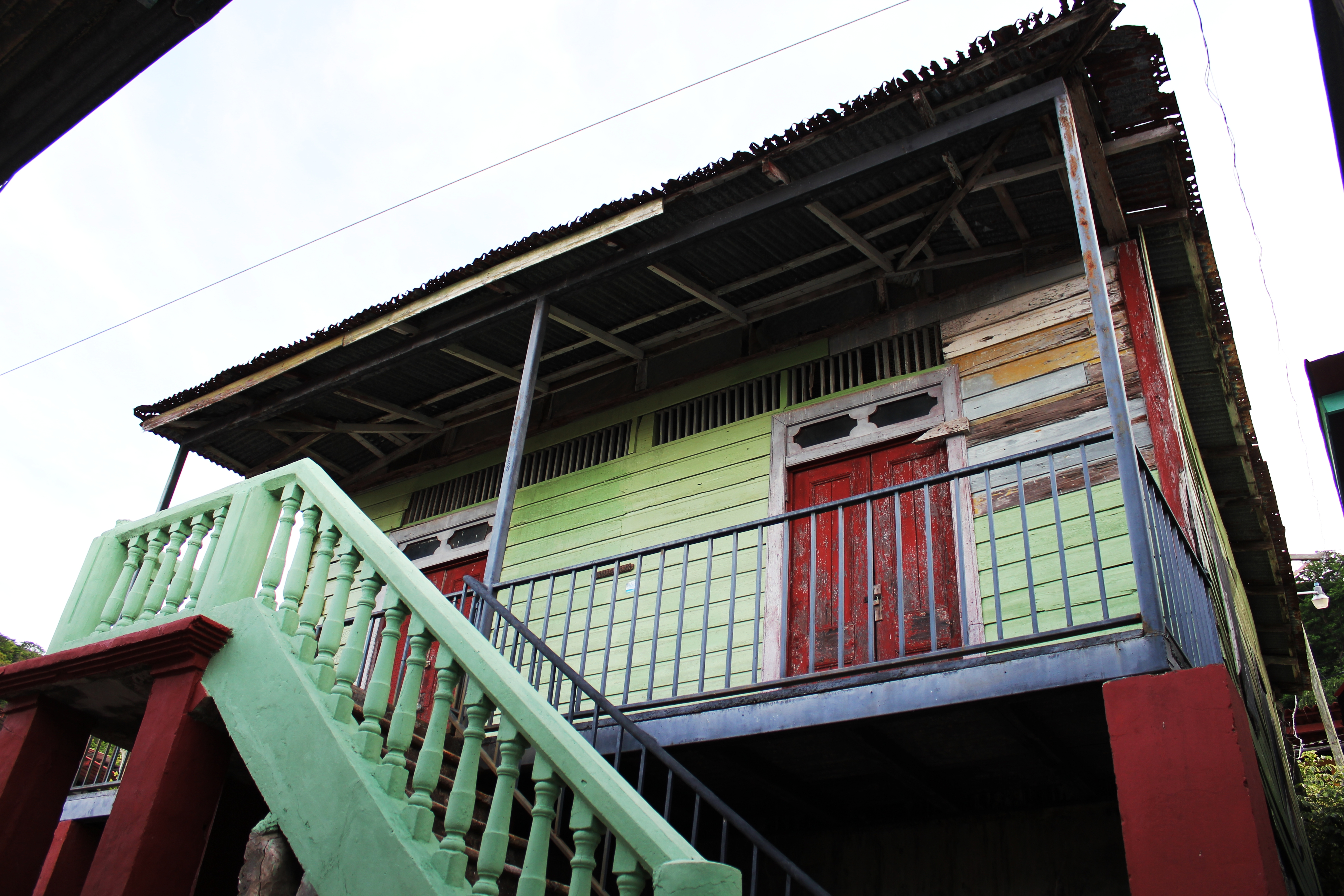 Casa del pintor Roberto Lewis en la isla de Taboga. Parte del Conjunto Monumental Histórico de Taboga declarado mediante Ley 6 del 13 de marzo de 2012. Panamá